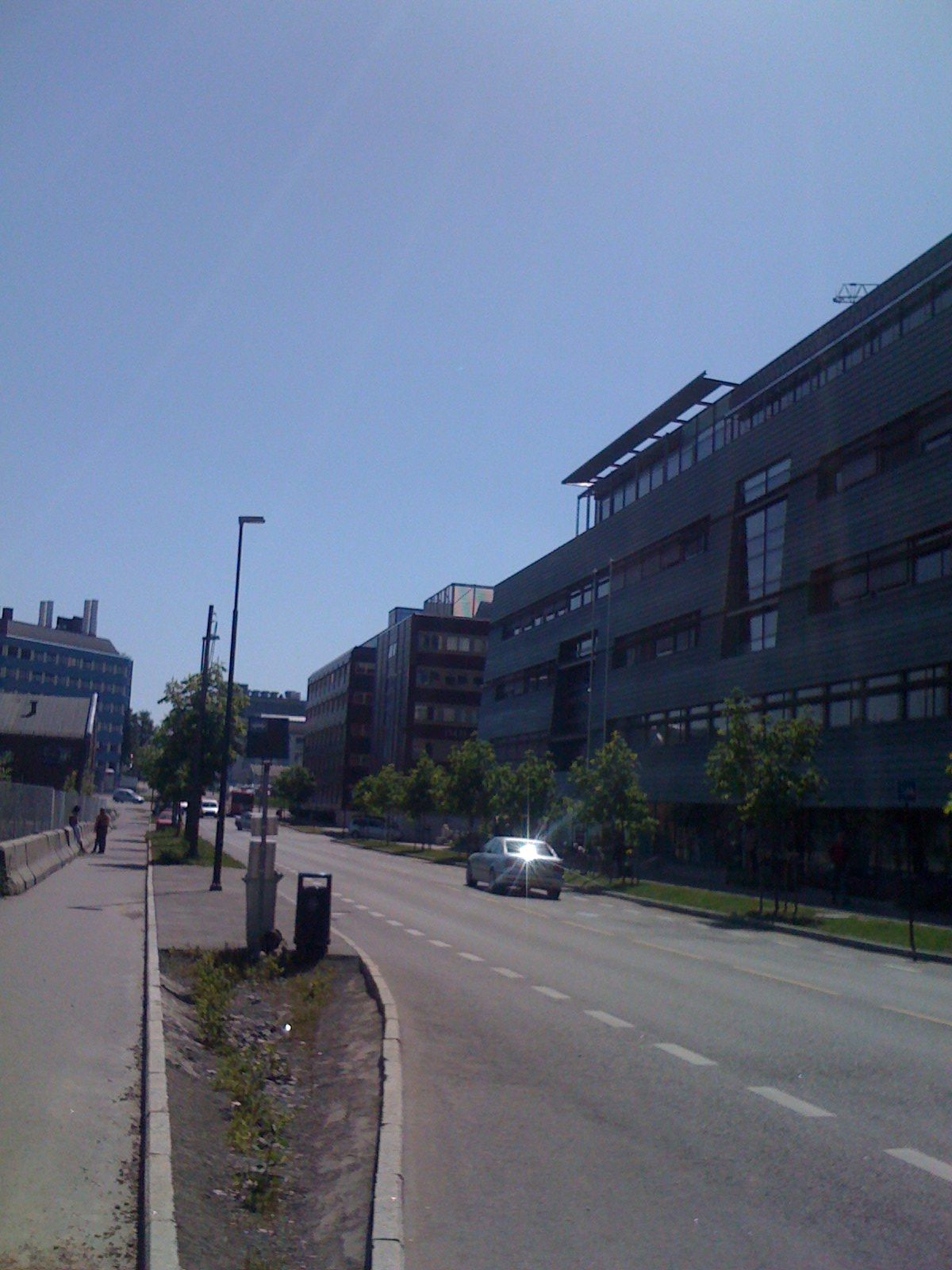 Sandakerveien i Nydalen, Oslo. Bygget til høyre er Handelshøyskolen BI.